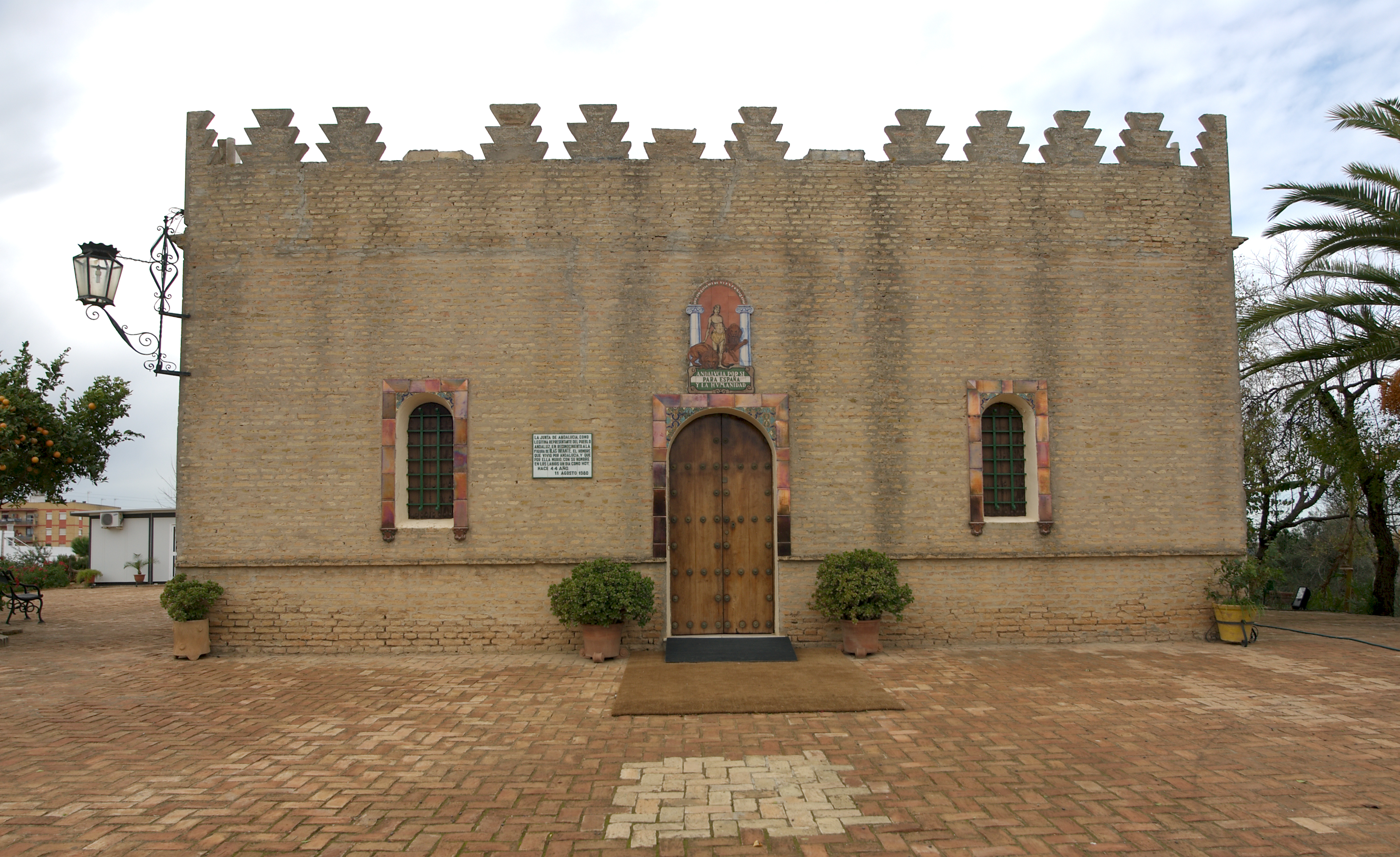 Fachada de la Casa Museo Blas Infante